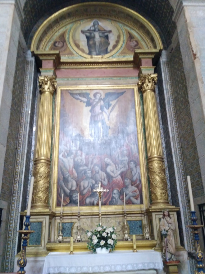 Tela datada de cerca 1580 da autoria de Jerónimo Corte-Real, patente na Igreja de Santo Antão (Évora).